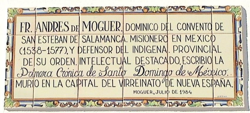 Placa homenaje a Fray Andres de Moguer